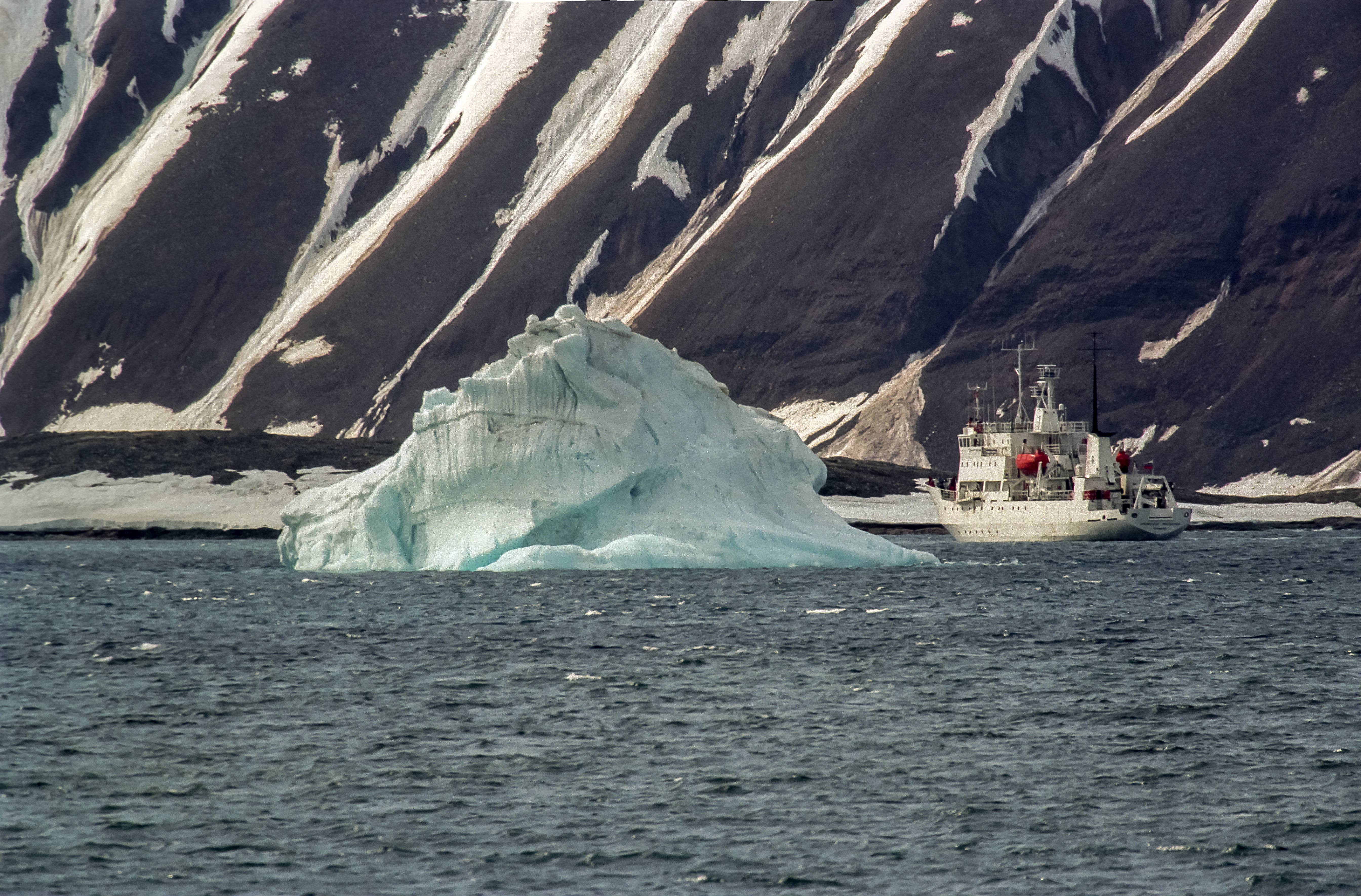 Svalbard, Hornsund, iceberg and vessel